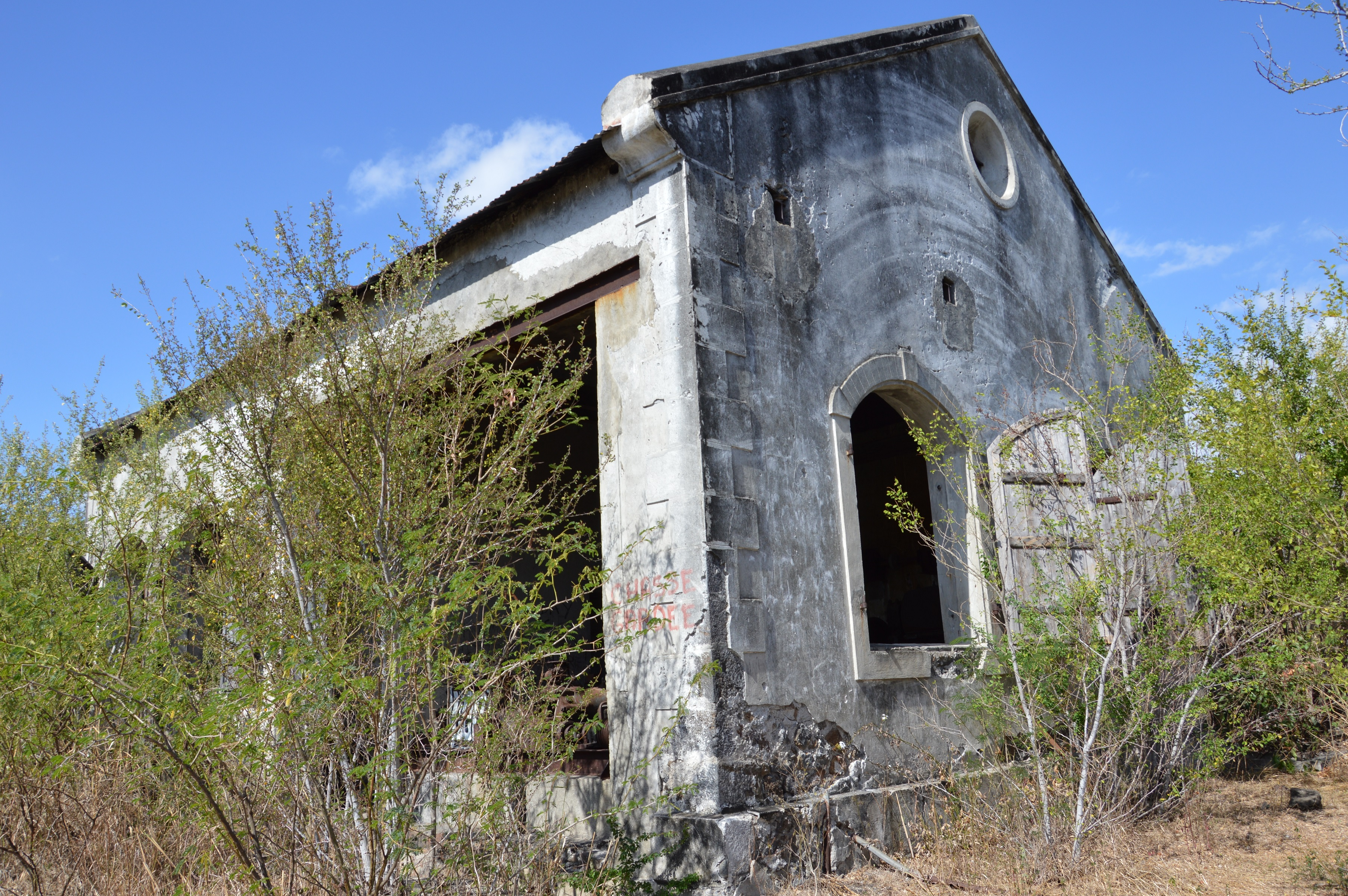 Ancienne station de pompage de Villèle